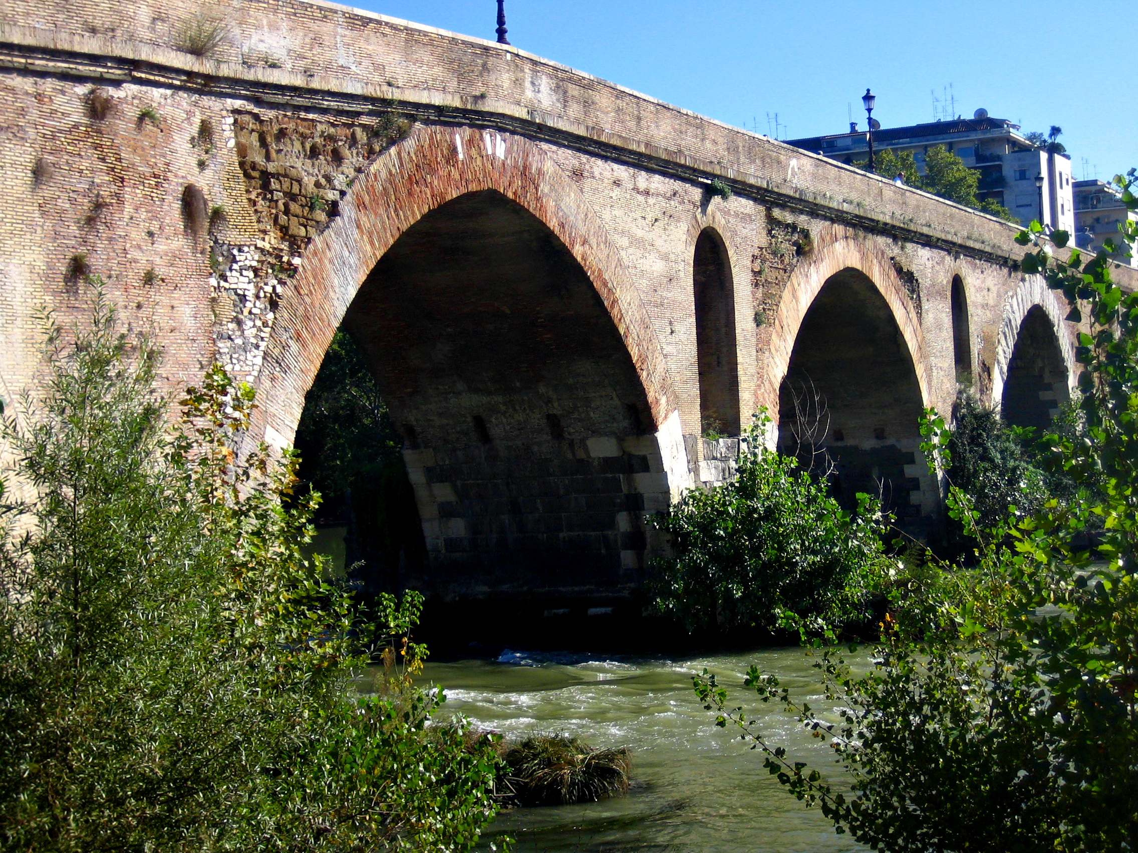 Ponte Milvio, Roma, Italia